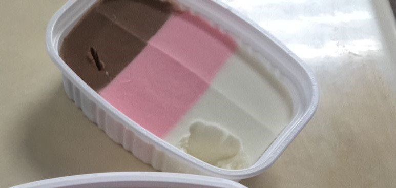 中文（中国大陆）: 光明牌三色冰激凌